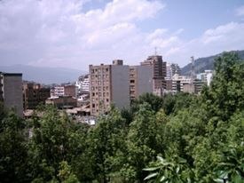 Vista Centro Duitama